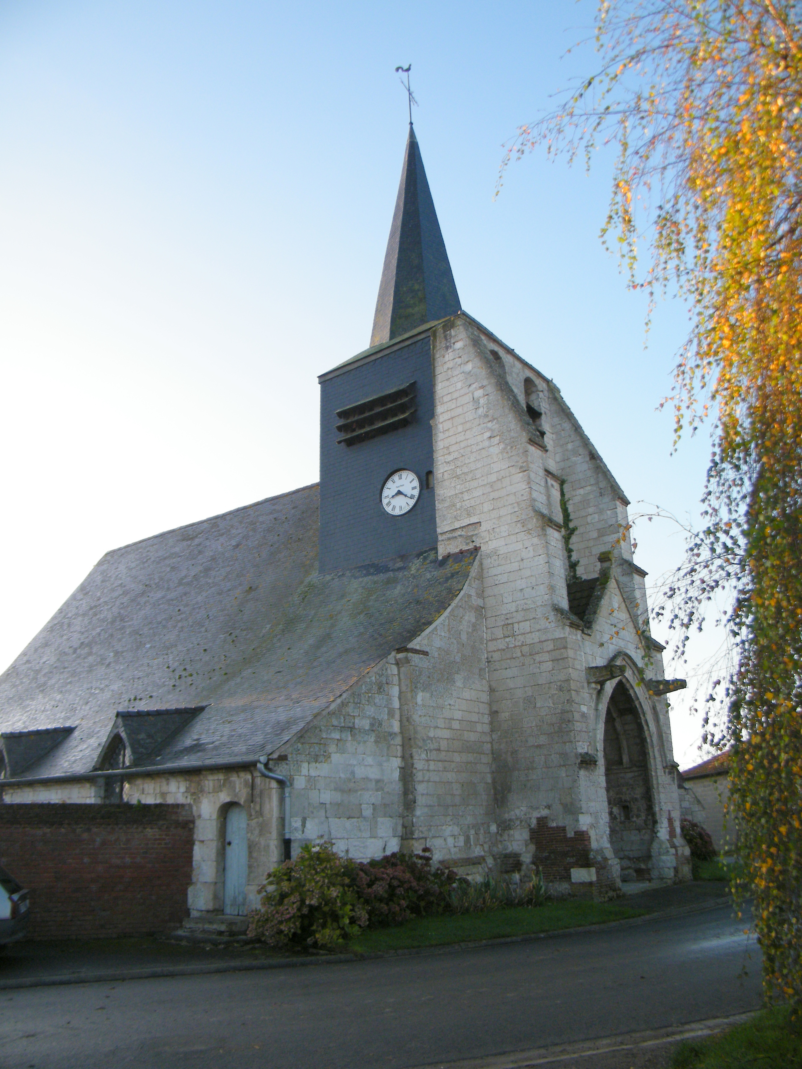 L'église.